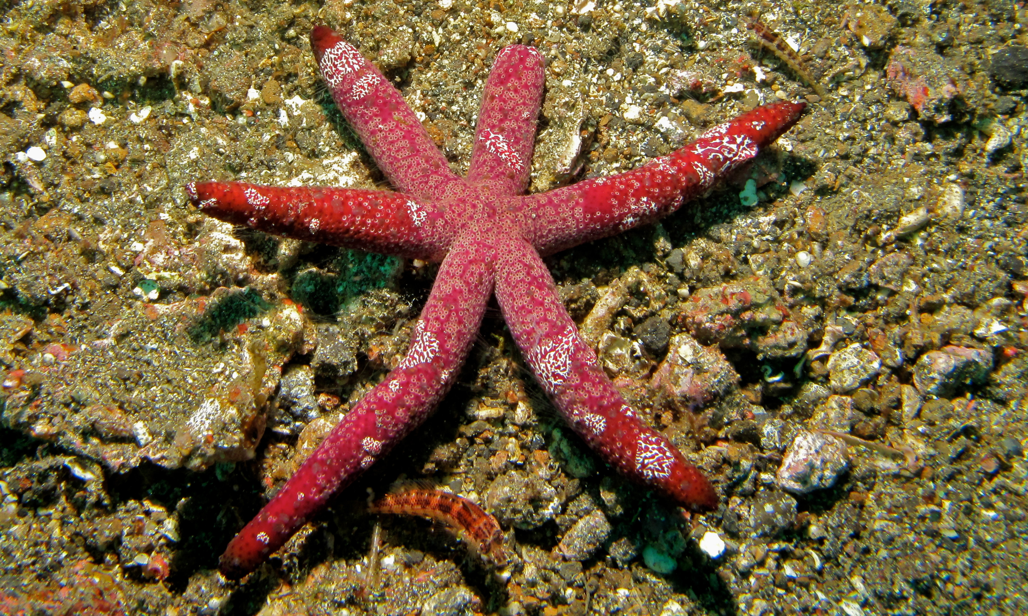 Tanjung Kubur, Lembeh Strait, Sulawesi, INDONESIA